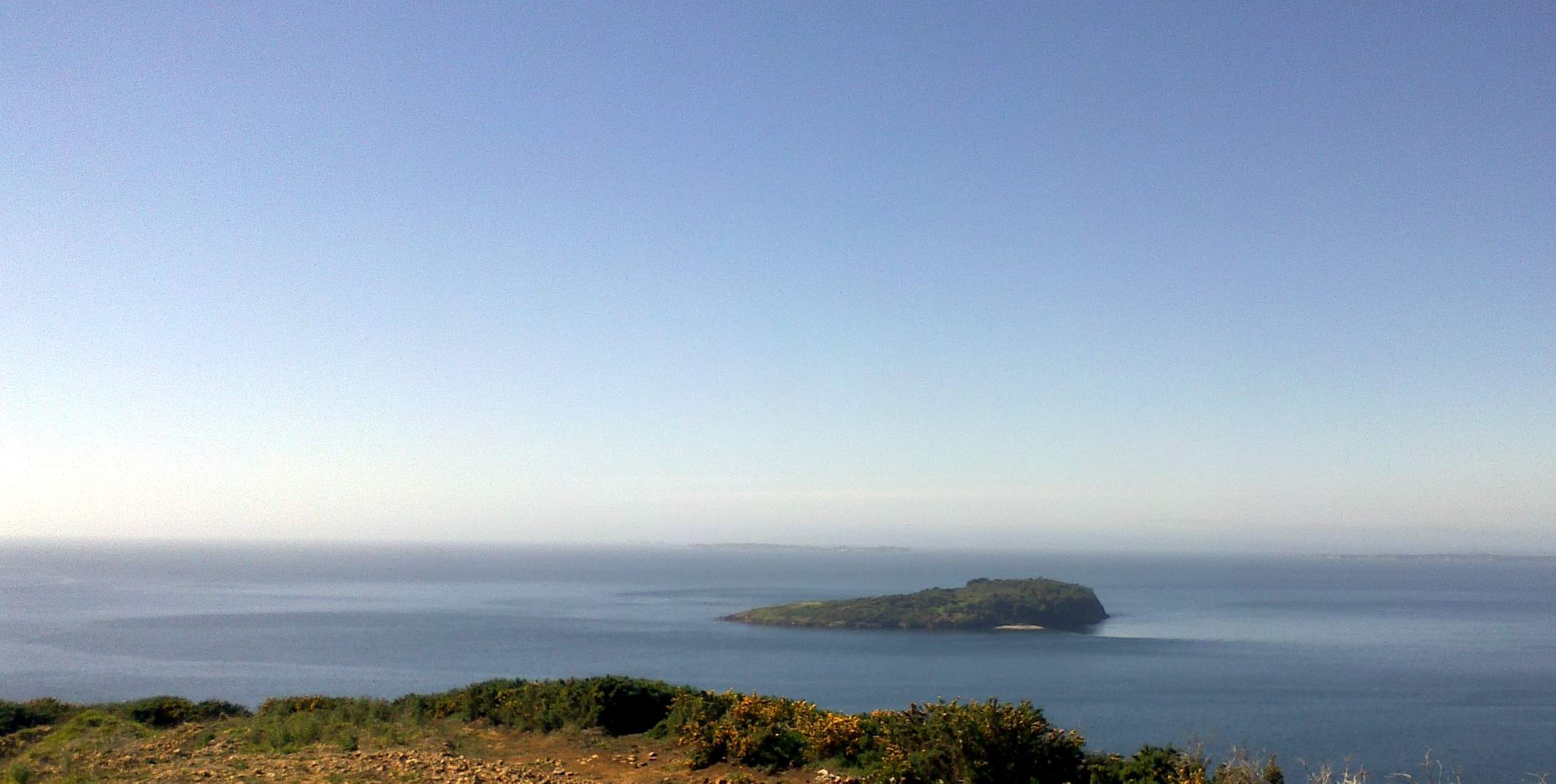 Isla Cochinos, archipiélago de Chiloé, desde el cerro Huaihuén, Ancud, Chile